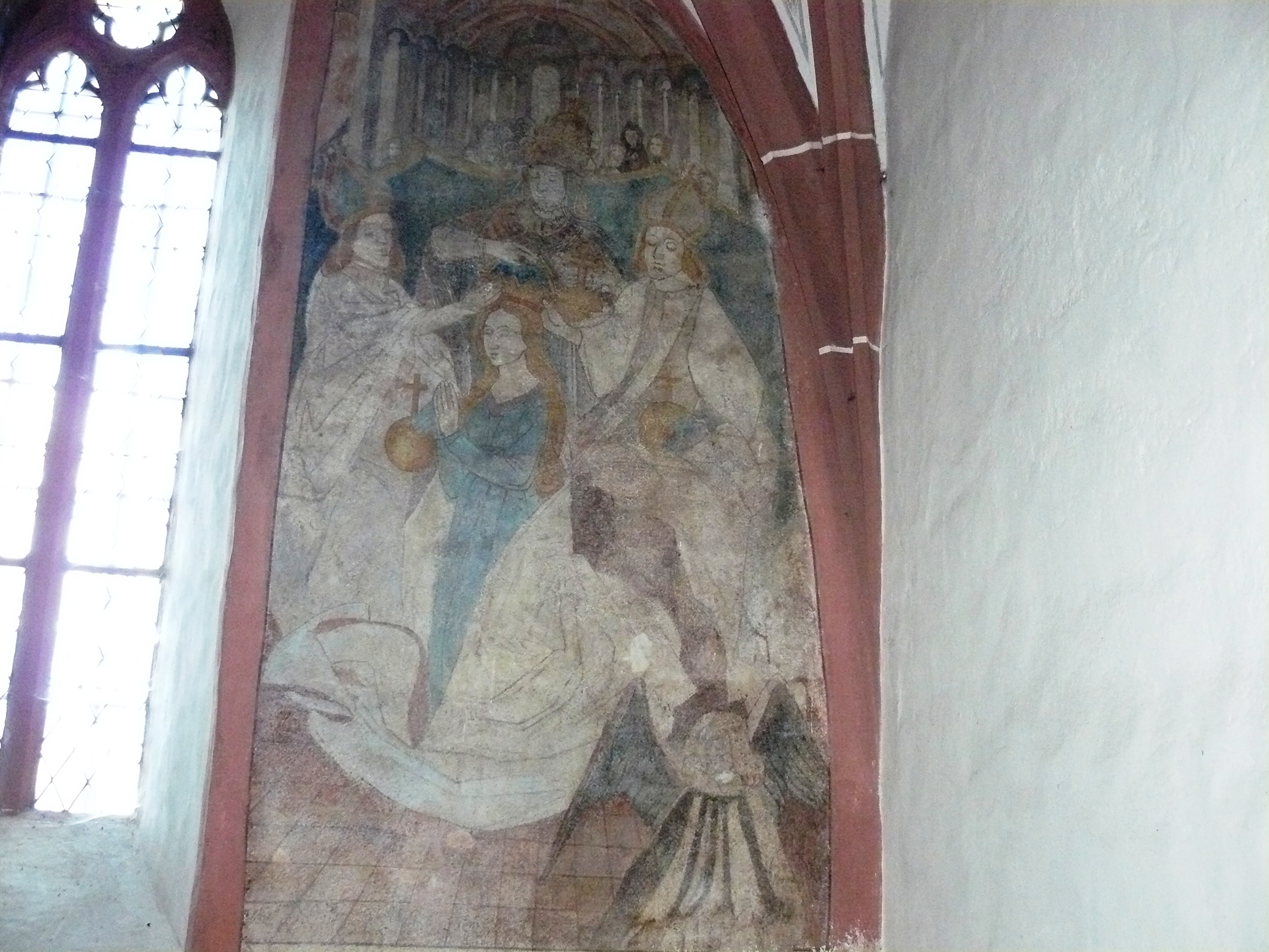 Fresque de la fin du XVe siècle représentant le couronnement de la Vierge ou de Sainte Hune